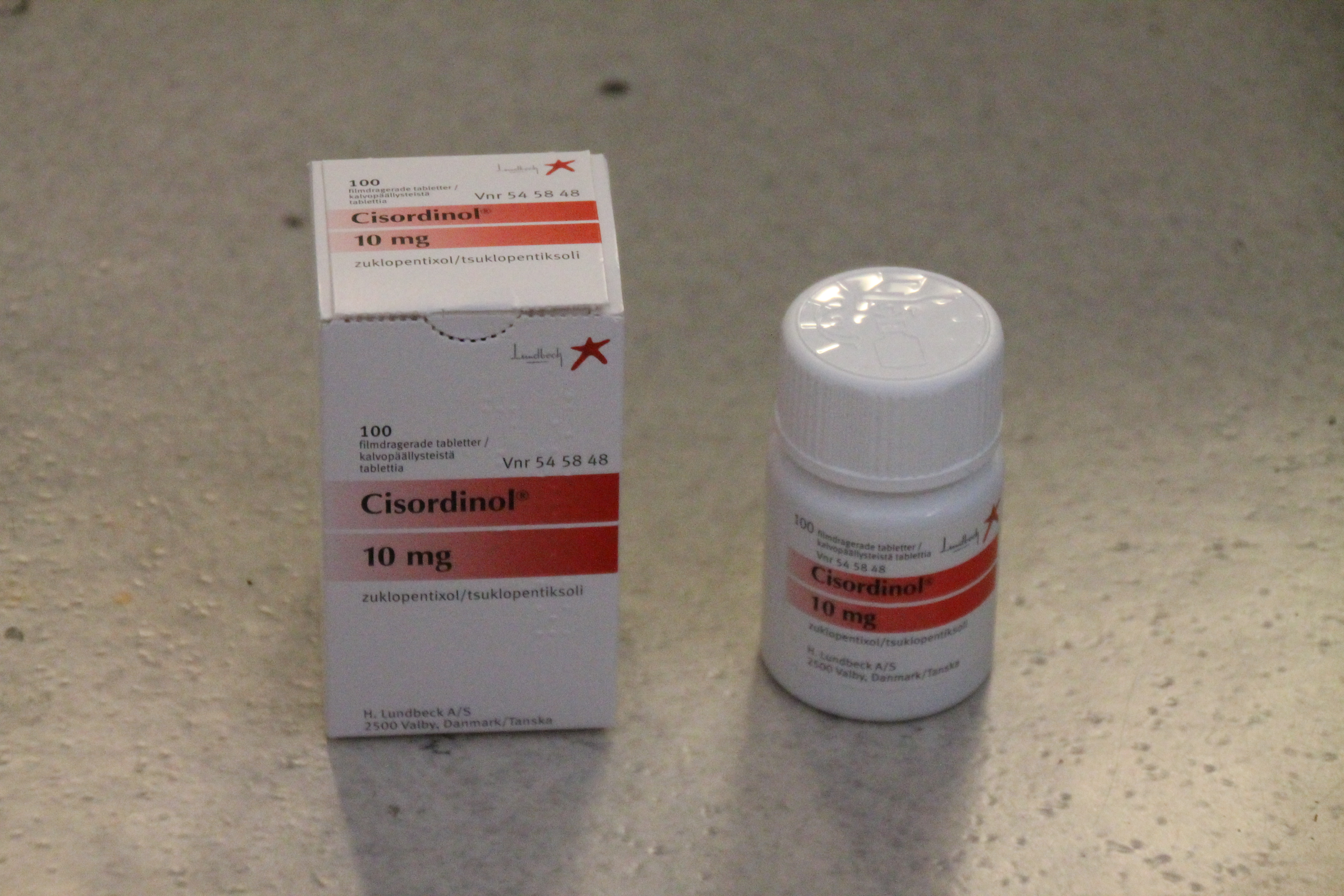 Cisordinol (zuclopenthixol) tablets